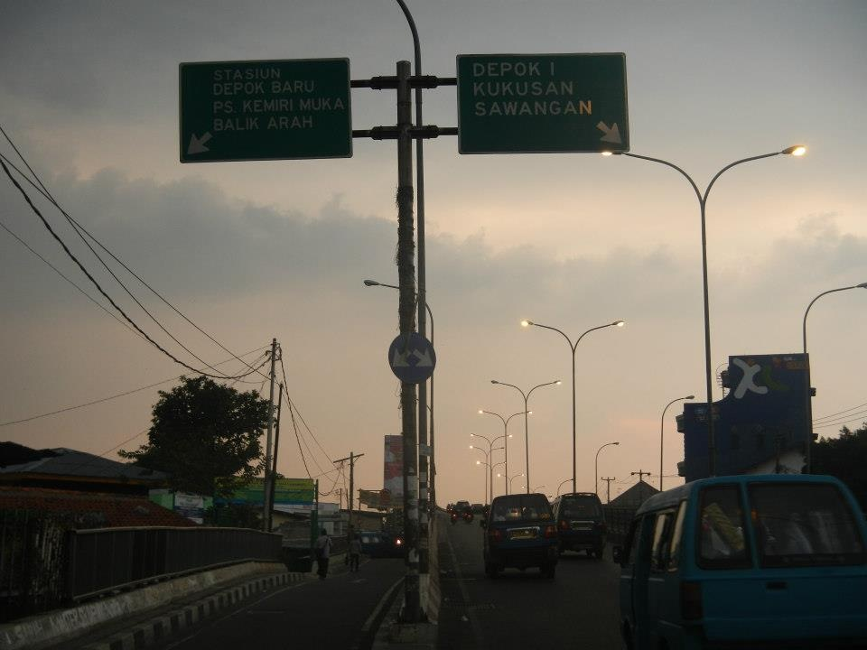 Jalan Arif Rahman Hakim Kota Depok